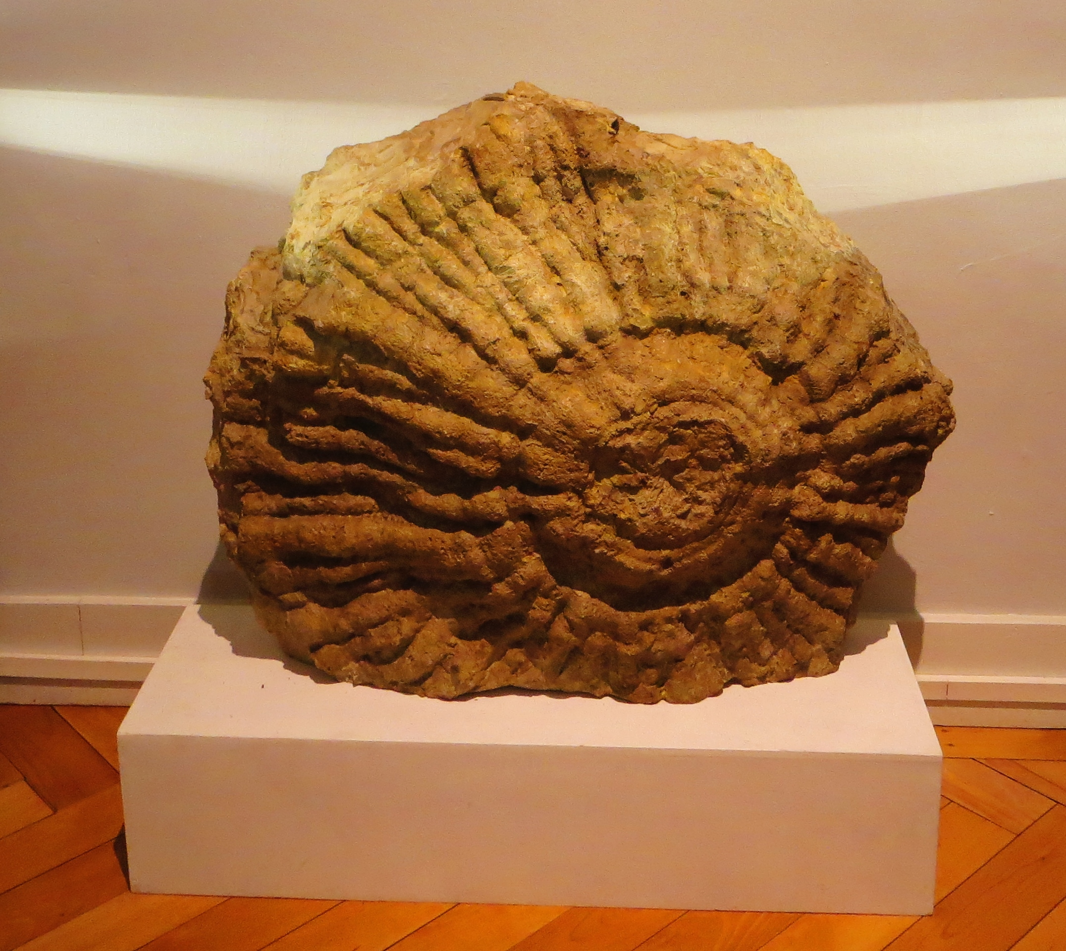 Fossil of Stauroderma, an extinct sponge- Took the picture at Museum of Paleontology, Tuebingen